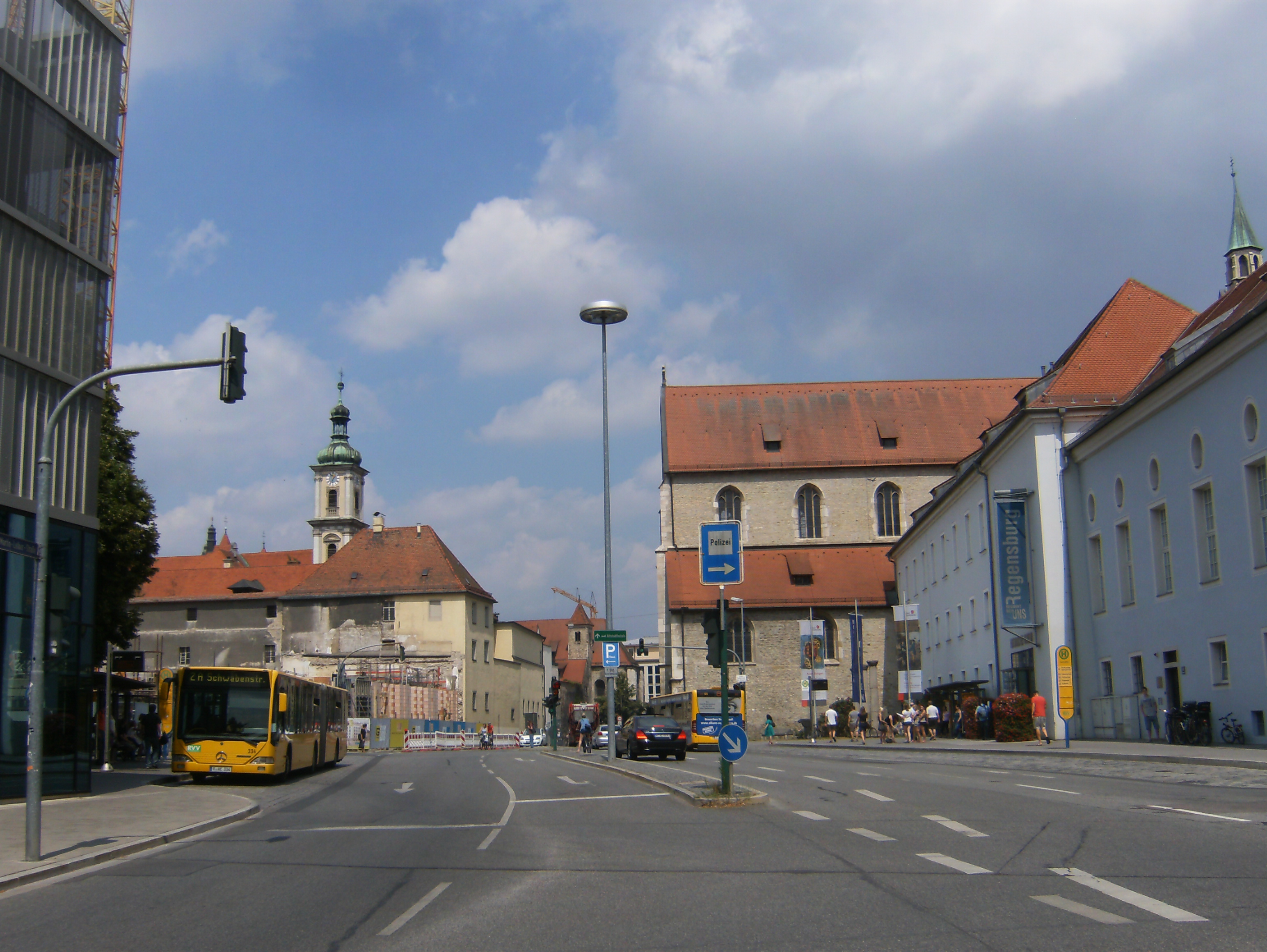 Dachauplatz, Blick von Süd nach Nord entlang der Durchgangsstaße